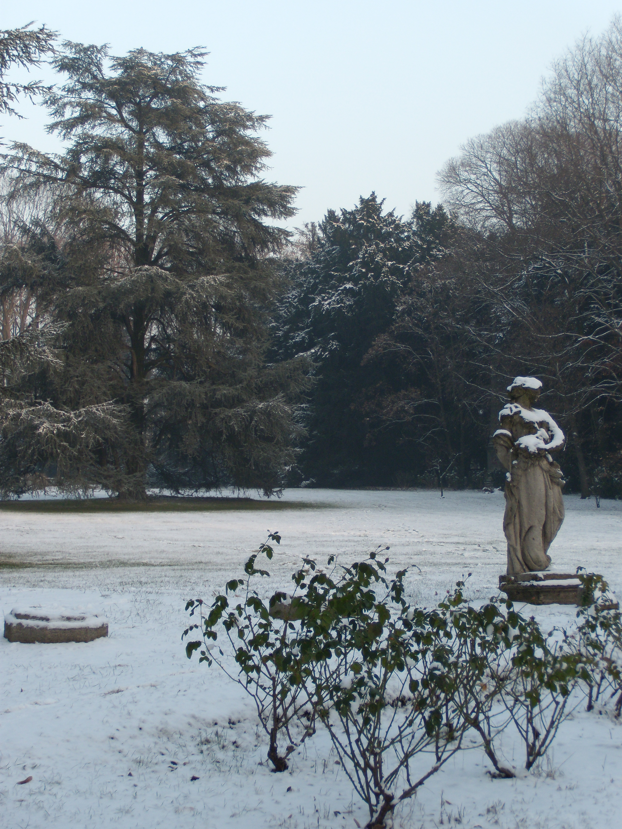 Cinisello Balsamo, il Parco di Villa Ghirlanda